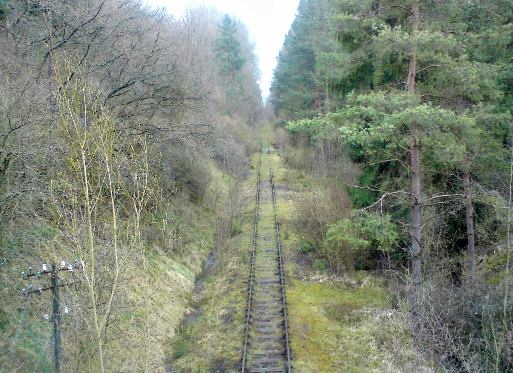 Der zwischen Althengstett und Calw gelegene Feldhütteeinschnitt der württembergischen Schwarzwaldbahn. Gut erkennbar auch der Bereich, in dem bis 1963 das zweite Gleis verlegt war. Die großen Hänge sind ziemlich zugewachsen. Fotografiert von Fußgängerbrücke über die Bahnstrecke bei Calw-Heumaden mit Blick in Richtung Althengstett